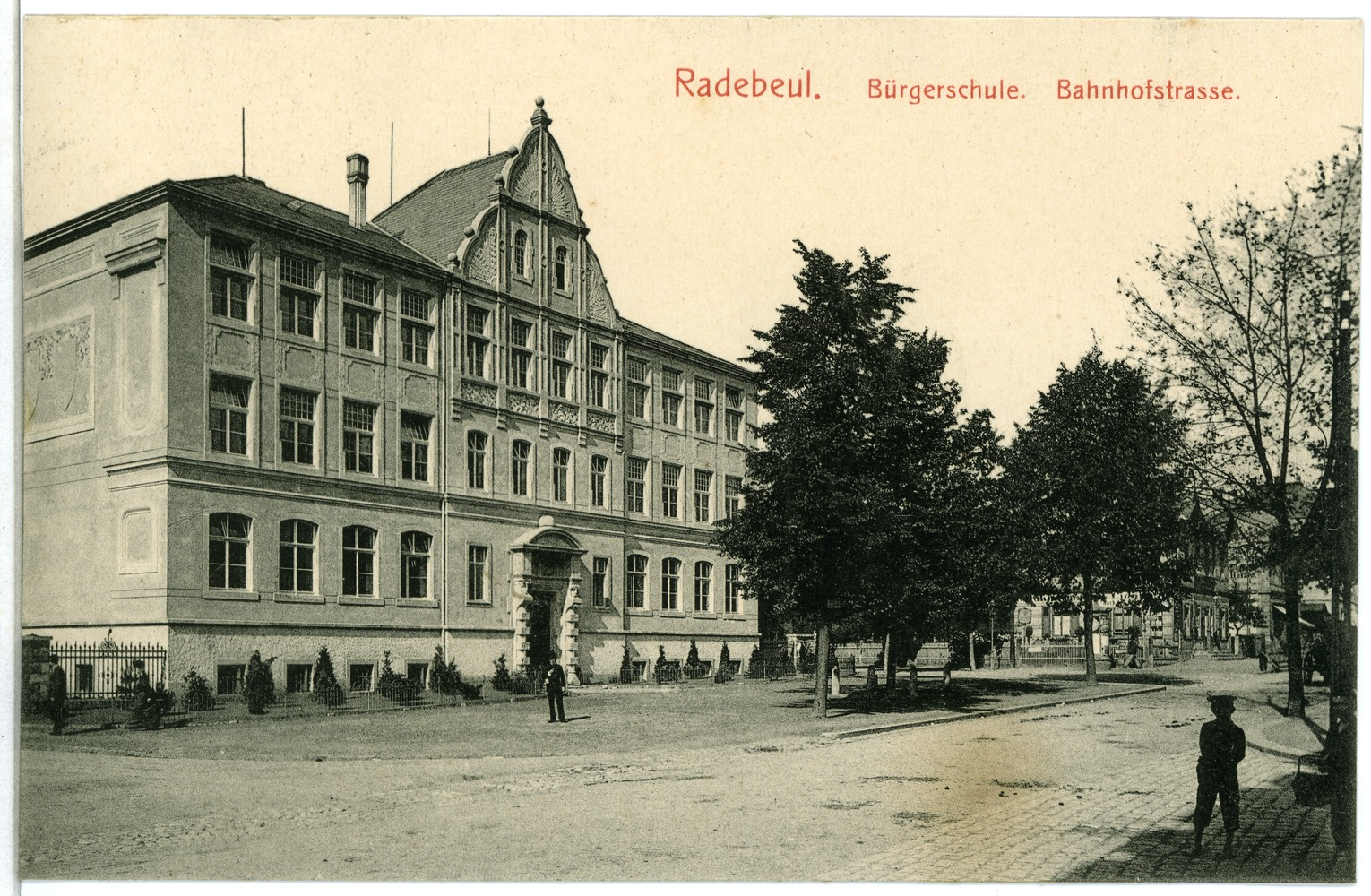 Radebeul; Bürgerschule - Bahnhofstraße This postcard is from publisher Brück & Sohn in Meißen ( postcard has a unique number 06081 and is available in a higher resolution at the publisher. This images was uploaded in a cooperation project between Wikipedians and the publisher.